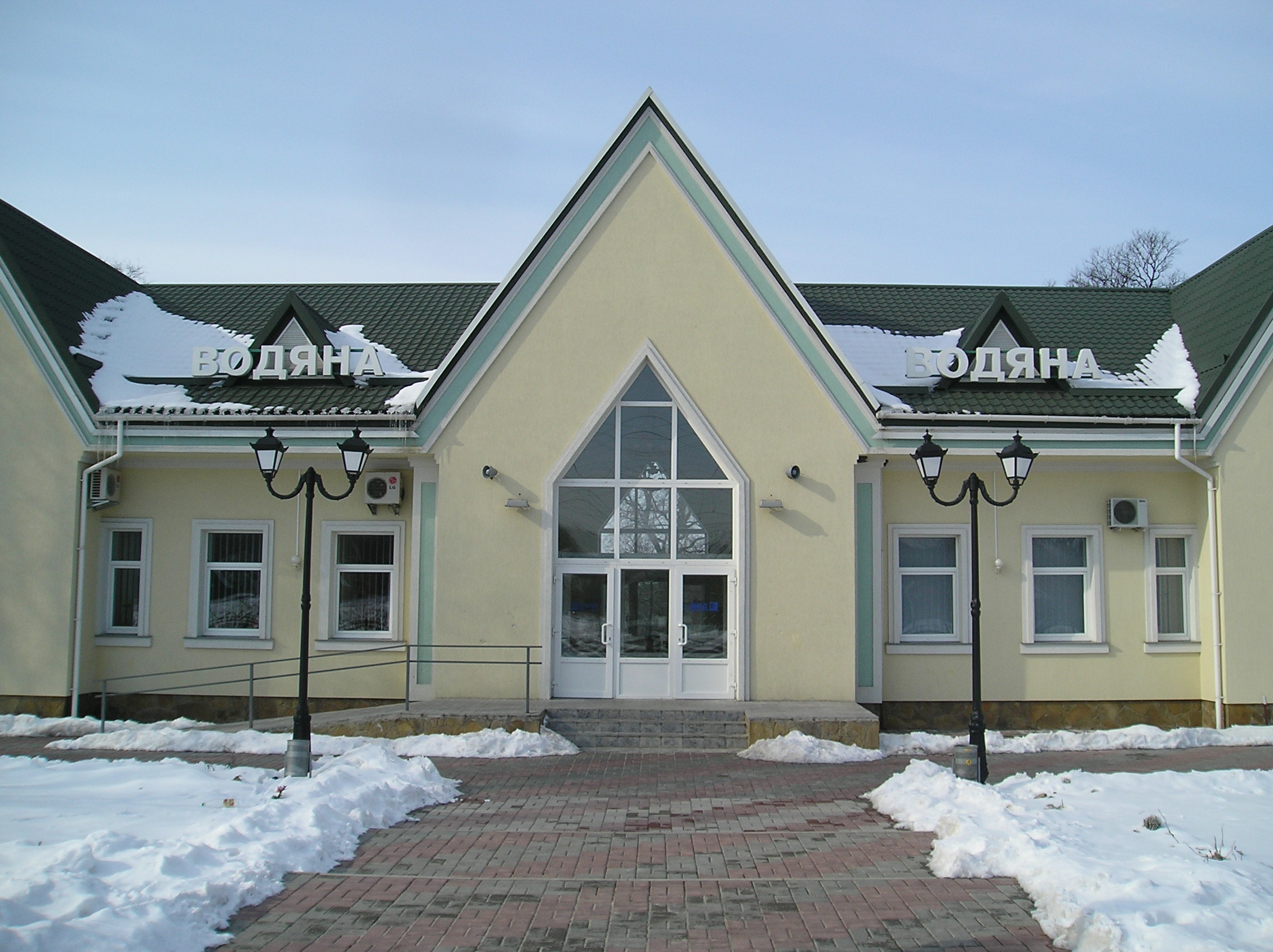 Станція Водяна